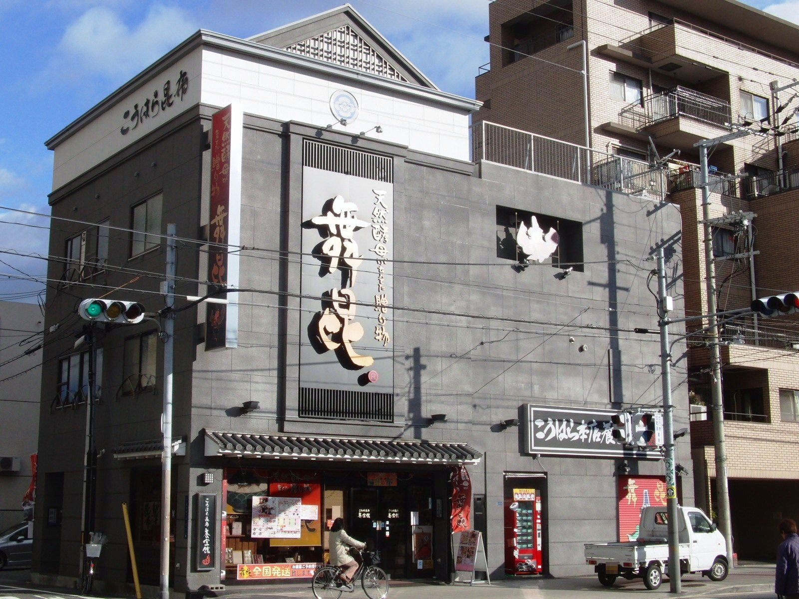 ㈱舞昆のこうはら本社を撮影